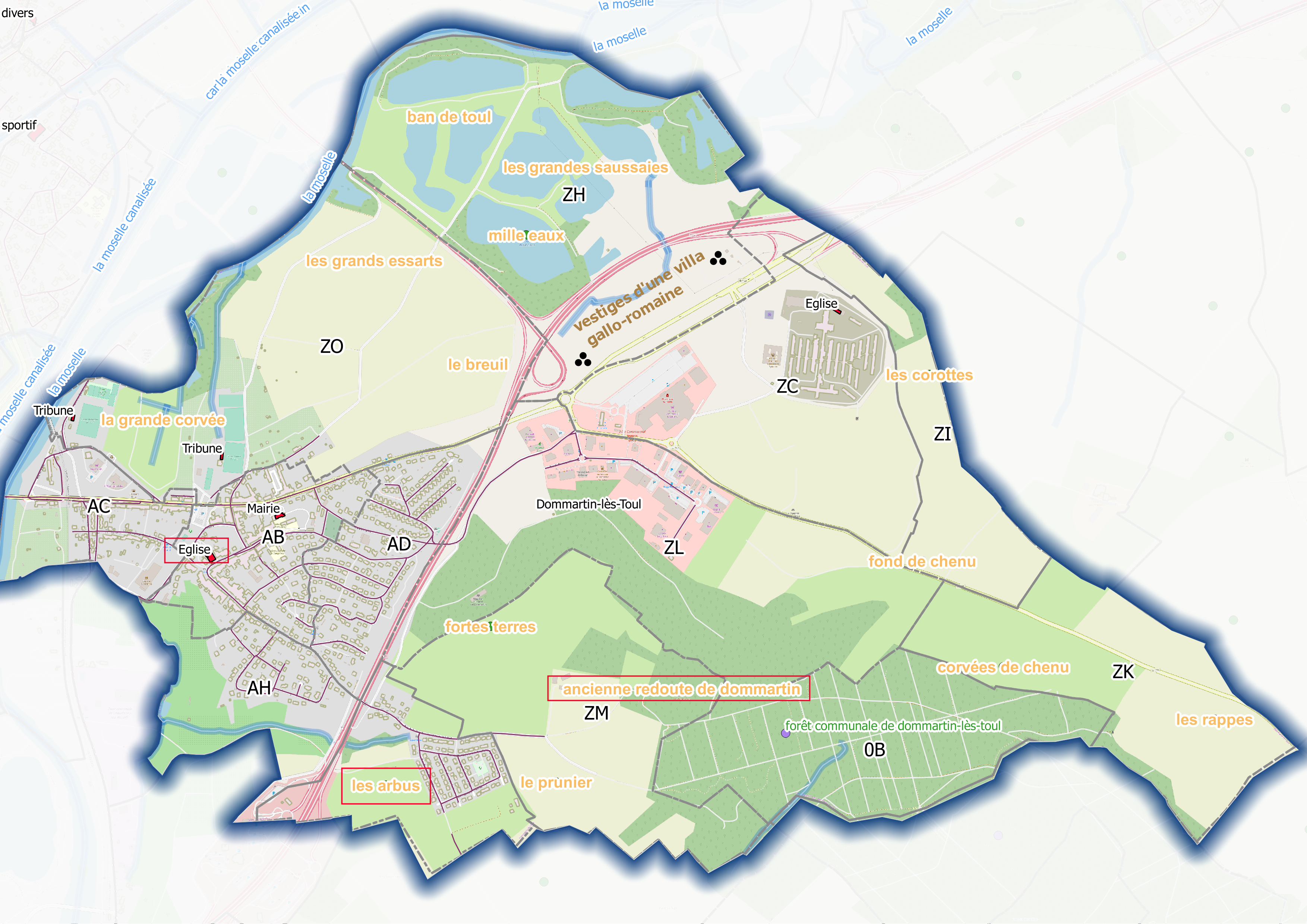 (OSM et Qgis)